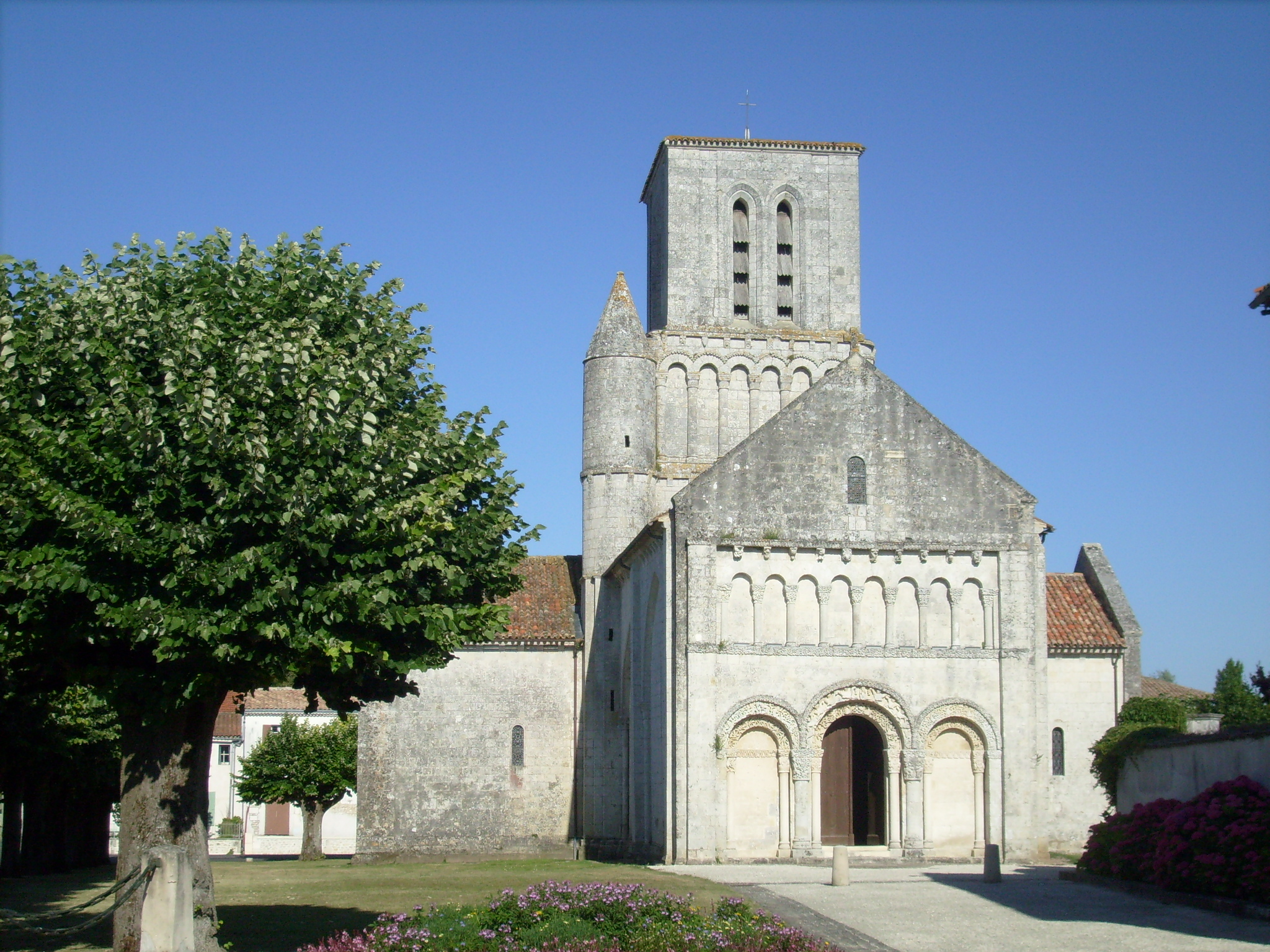 L'église de Corme-Ecluse